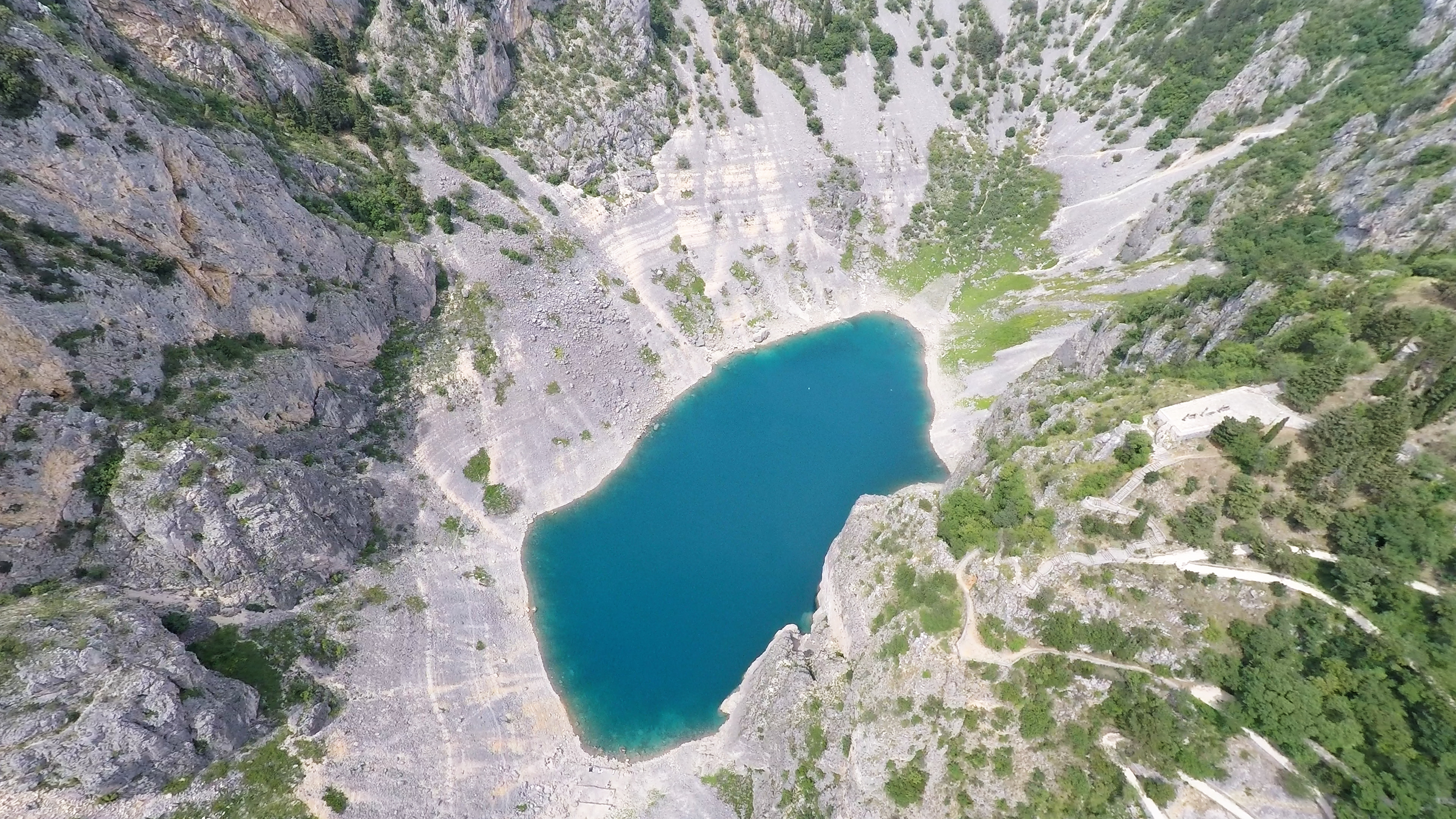 Modro jezero